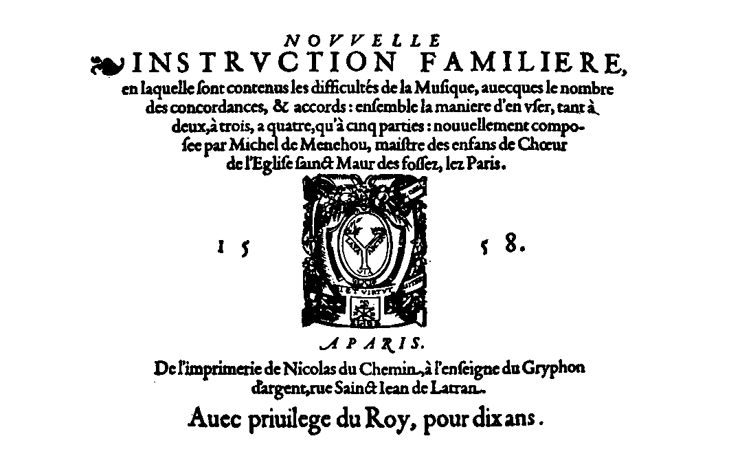 Page de titre de la Nouvelle instruction familière (chez Nicolas du Chemin, 1558)